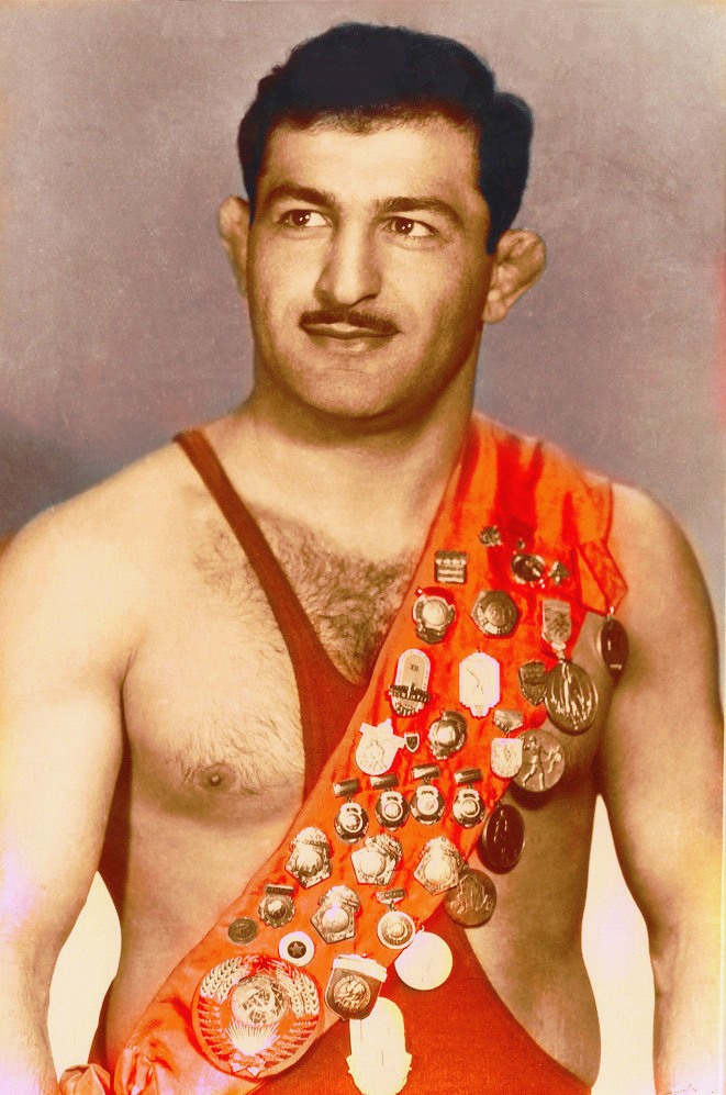 Template:Ruben Vardanyan